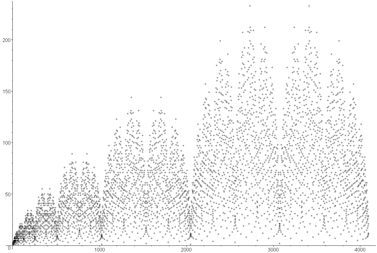 Représentation graphique des points [n,s(n)] où s(n) est la suite diatomique de Stern définie par s(1) = 1, s(2n) = s(n), s(2n+1) = s(n) + s(n+1)